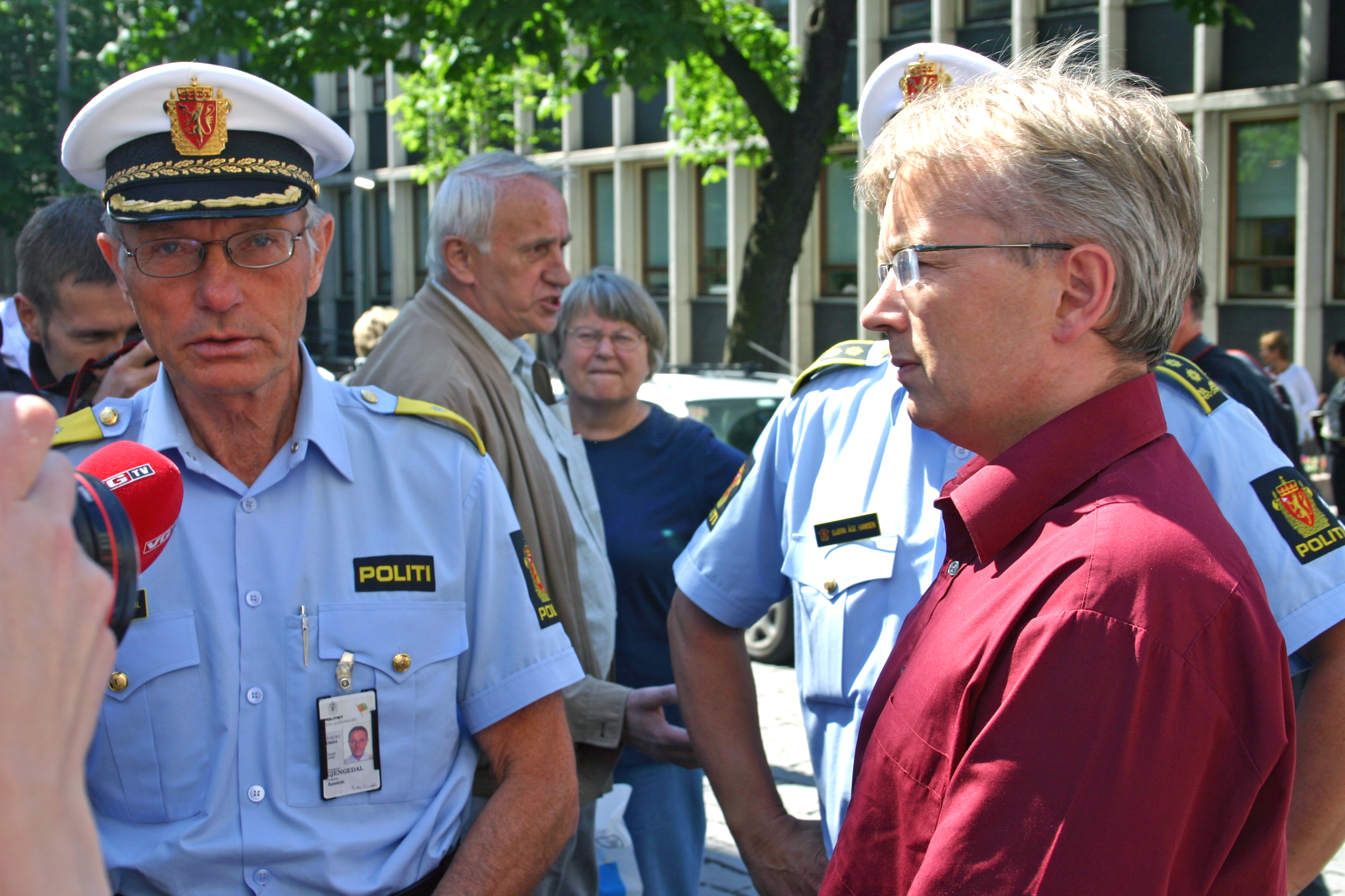 Justisminister Knut Storberget (til høyre) på Karl Johan sammen med politistudenter og politimester i Oslo Anstein Gjengedal (venstre).